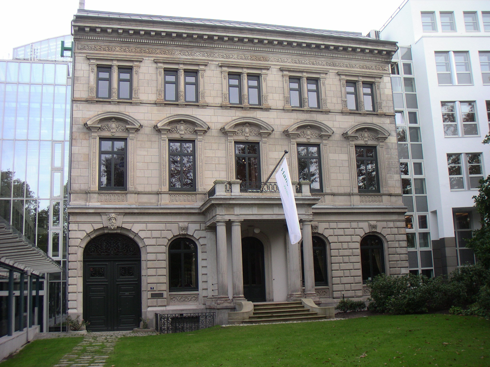 Hamburg, Haus Wedell, Siegfried-Wedells-Platz 1, fr. Neue Rabenstrasse 31, Teil der Verwaltung der Signal-Iduna, Hof und Vorgarten: This is a photograph of an architectural monument. 12029